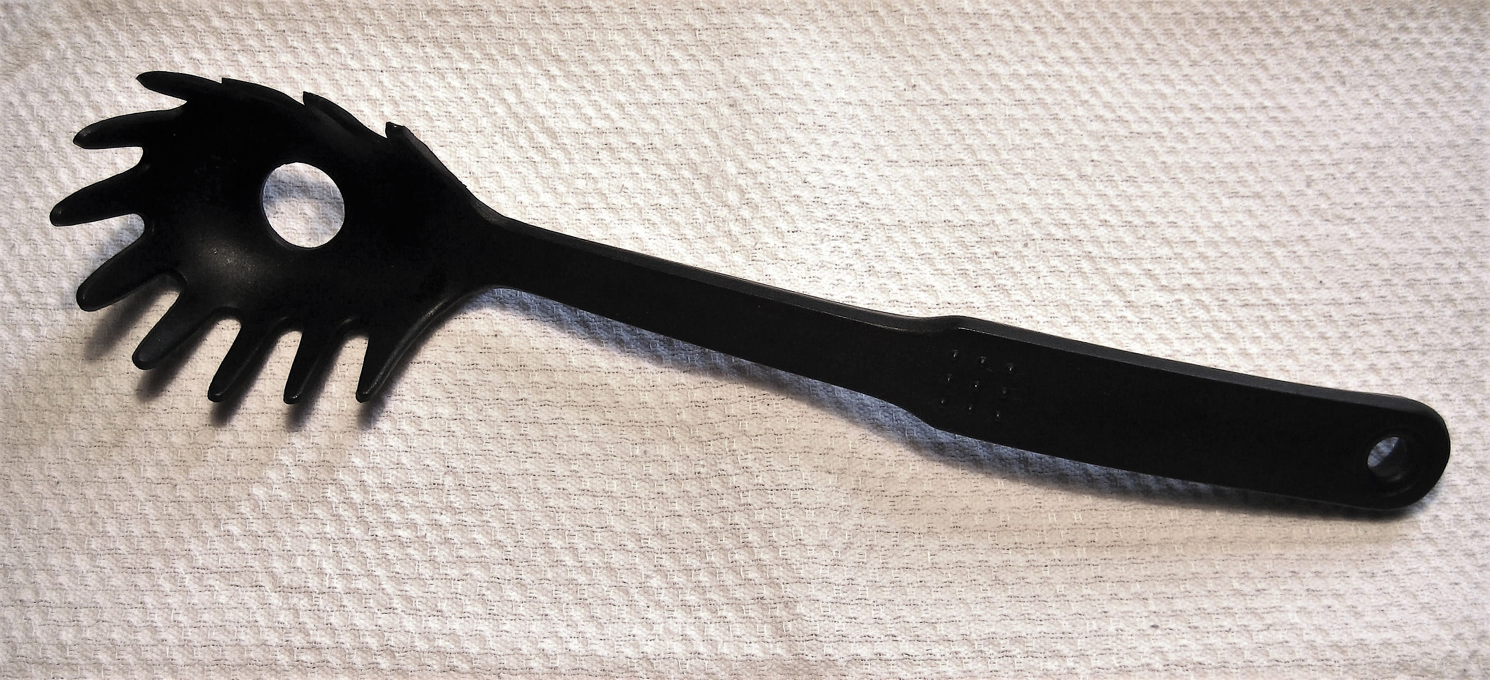 Spaghettiheber aus Kunststoff